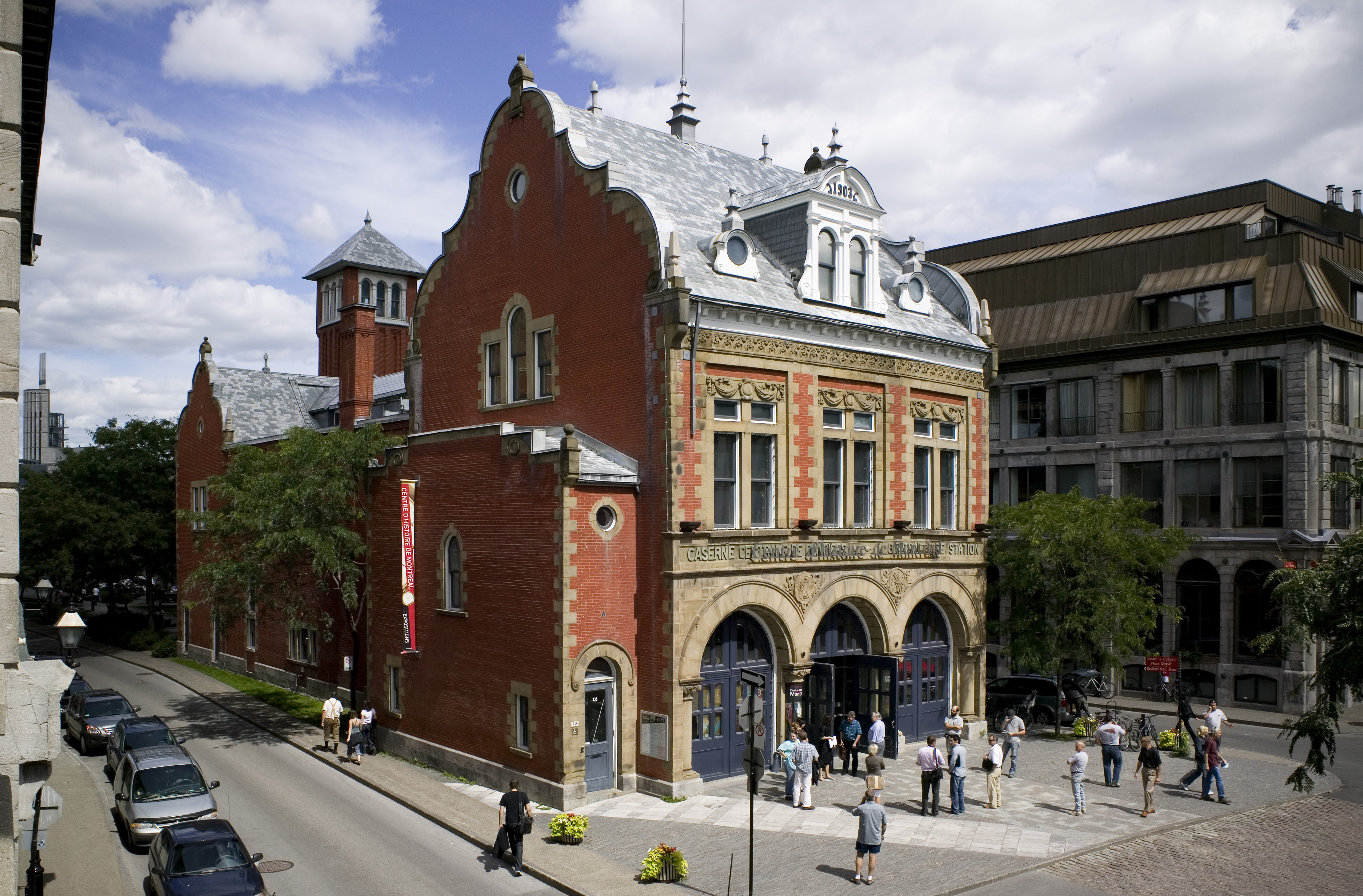 Extérieur du Centre d'histoire de Montréal